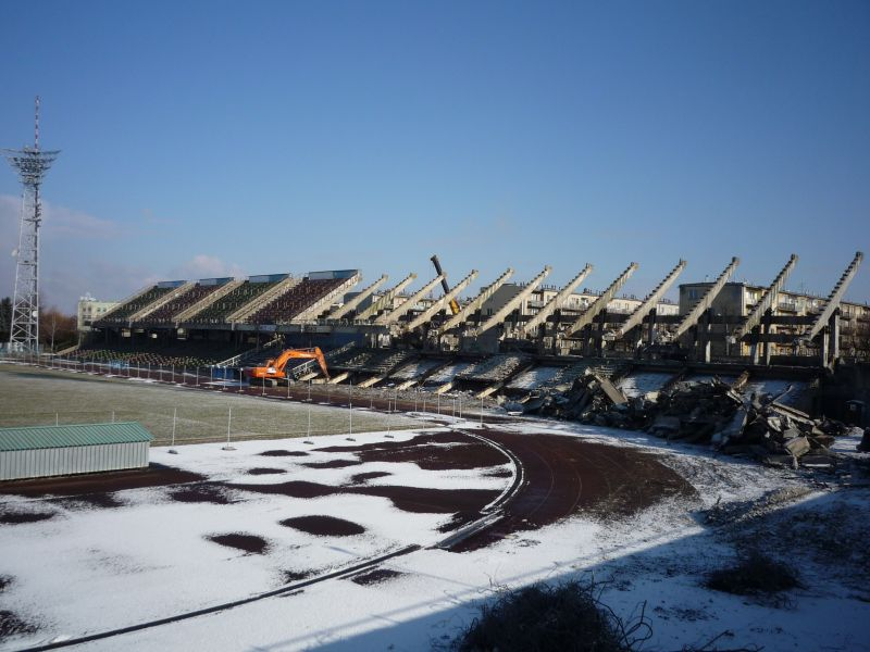 Wyburzanie trybuny Stadionu Stali od strony ul.Solskiego.